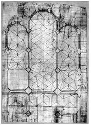 Grundriss des Chores der Stadtpfarrkirche Steyr. (Akademie der Bildenden Künste Wien, Bibliothek, Inv. Nr. 17.052)